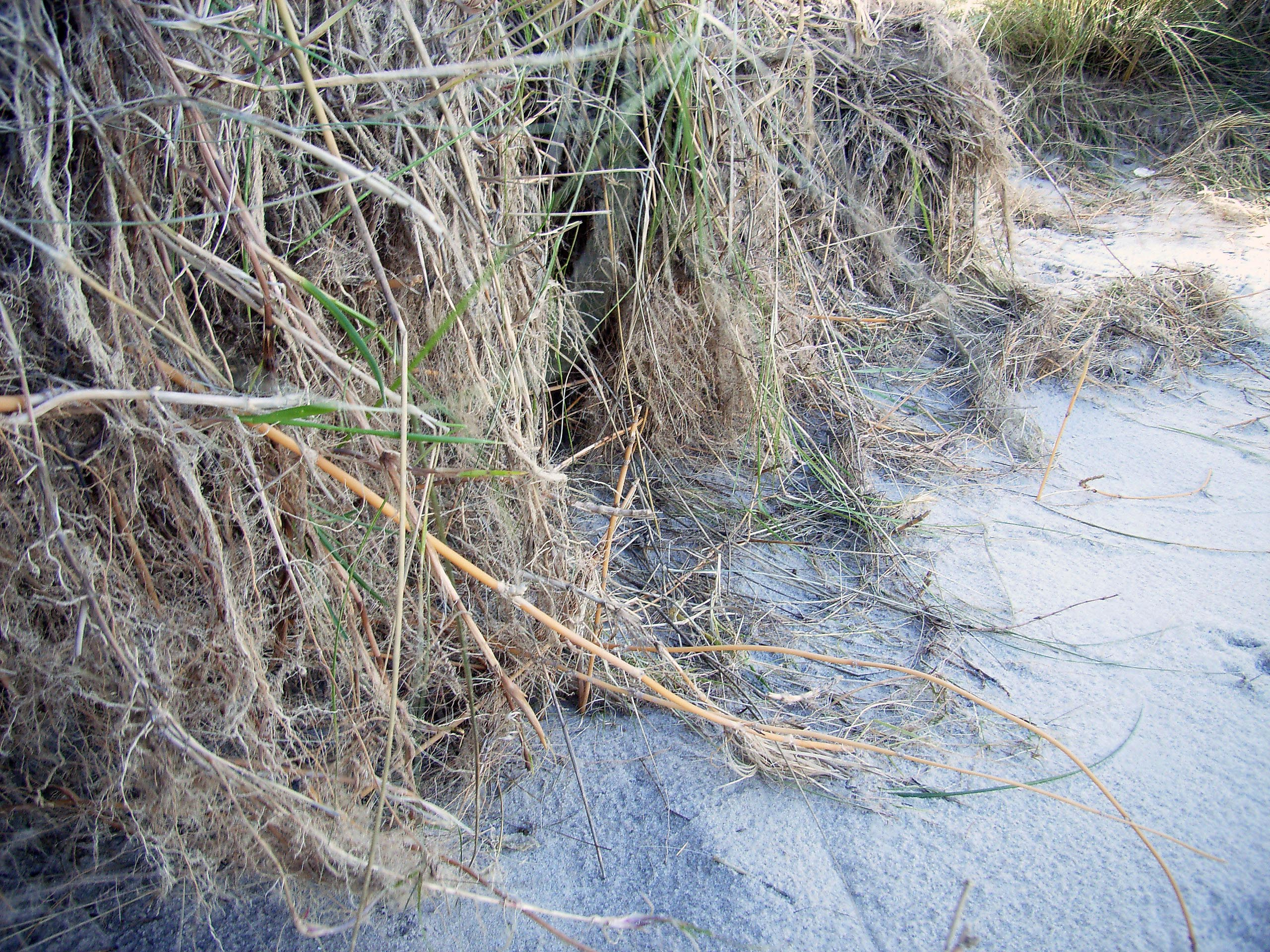 Ammophila arenaria, Abbruchkante eine Düne mit freigelegtem Wurzelwerk; LK Friesland, Niedersachsen